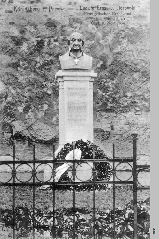 Borowskidenkmal in Königsberg